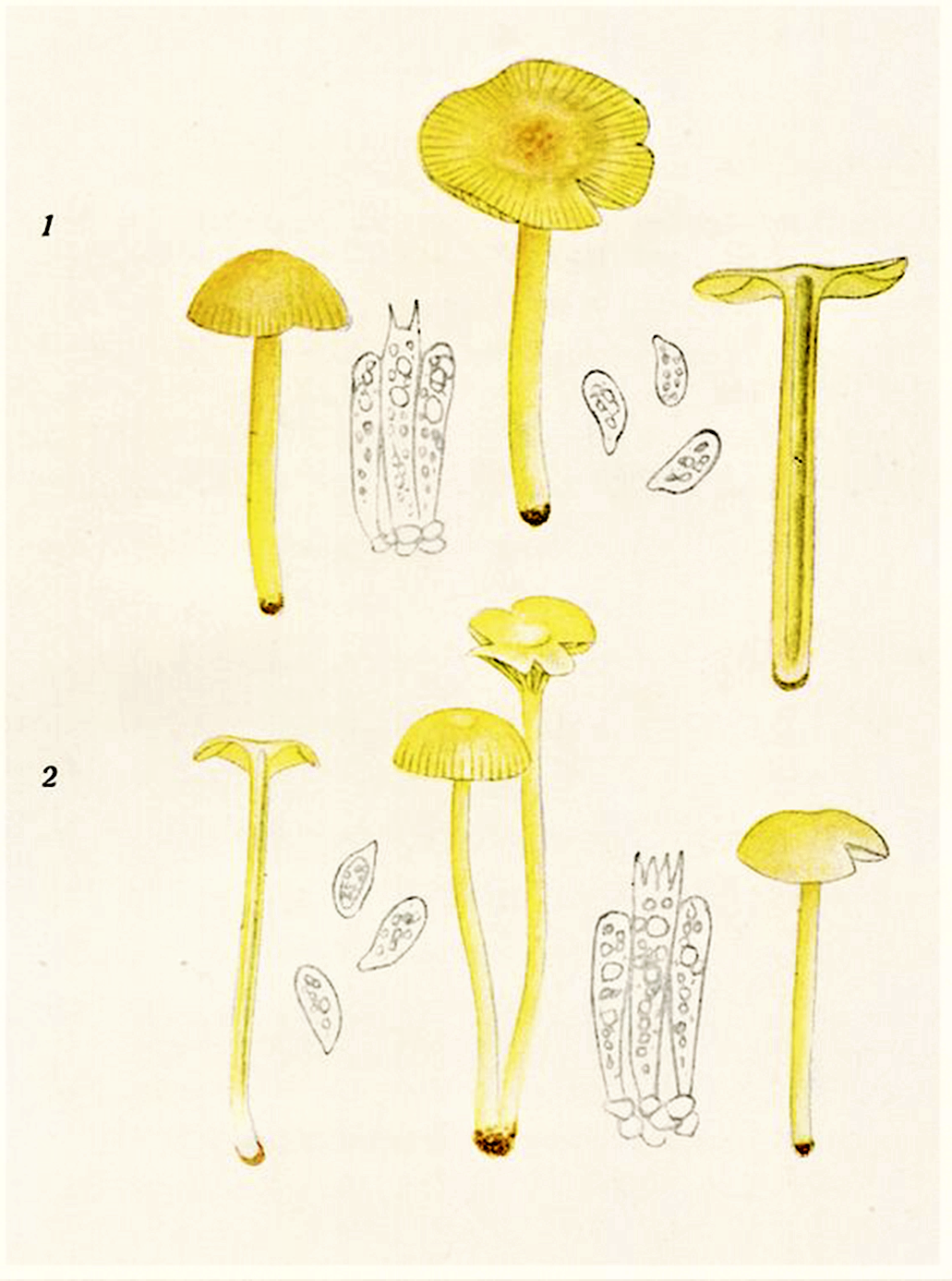 1. Bres.: Hygrophorus chlorophanus (Fr.), 1821), Fr. 1838), heute Hygrocybe chlorophana (Fr. : Fr.) Wünsche (1877); 2. Giacomo Bresadola: Hygrophorus vitellinus Fr. (1863), heute Hygrocybe vitellina (Fr., 1863) P.Karst. (1879) oder Gloioxanthomyces vitellinus (Fr., 1863) Lodge, Vizzini, Ercole & Boertm. (2013)